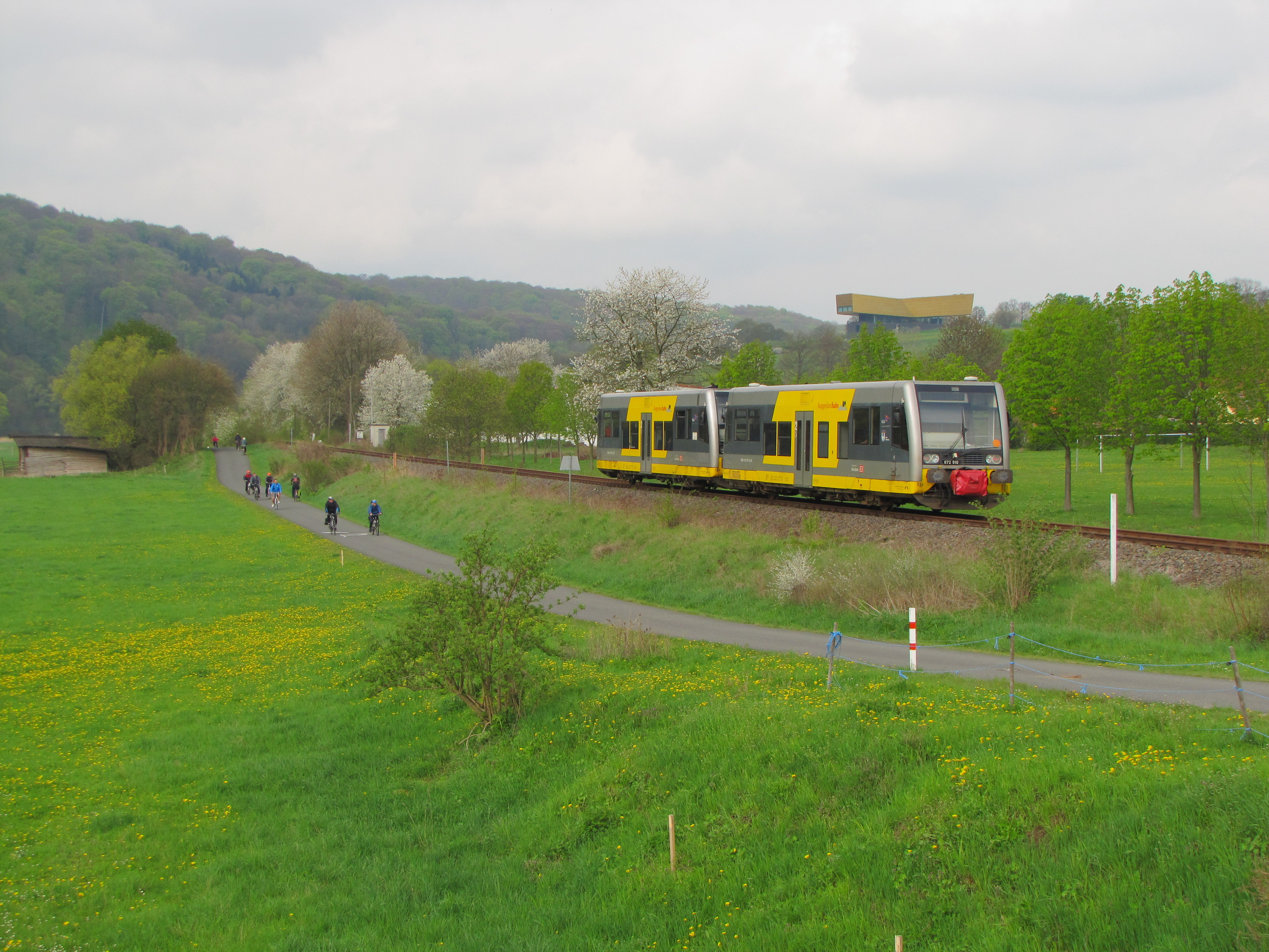 Burgenlandbahn 672 902 + 672 910 als RB 34868 (Naumburg Ost - Roßleben), am 01.05.2013 in Wangen. Durch den Feier- und Unstrutradwegtag verkehrten einige Personenzüge im Auftrag der IG Unstrutbahn e.V. bis/ab Roßleben